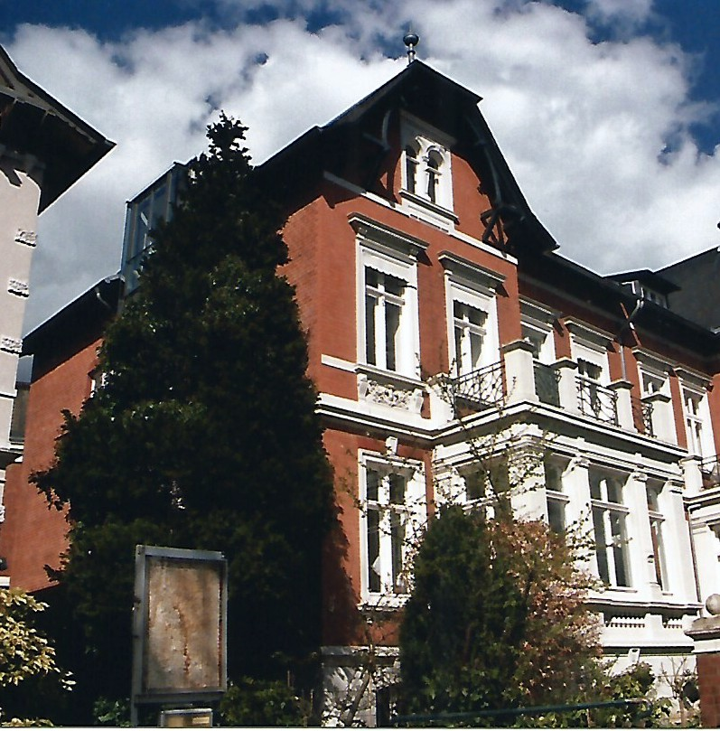 Lübeclisches Haus des Generals